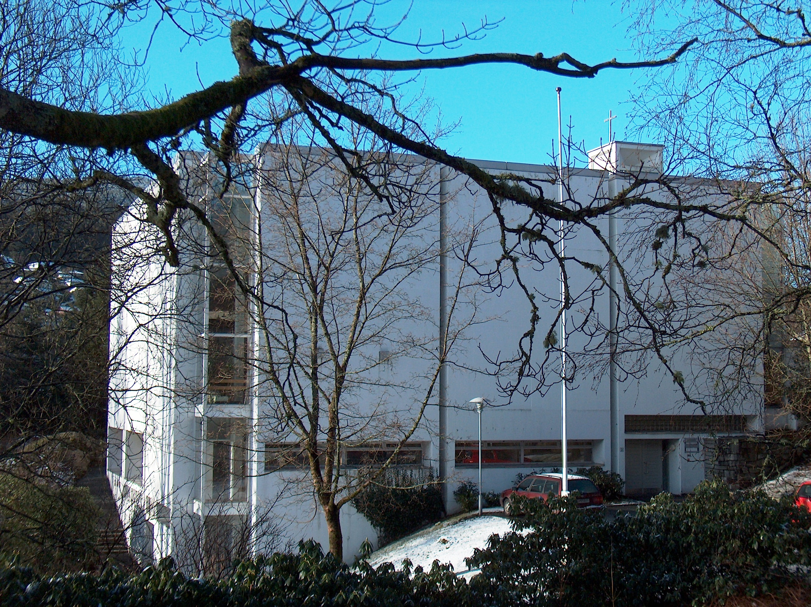 Eidsvåg kirke